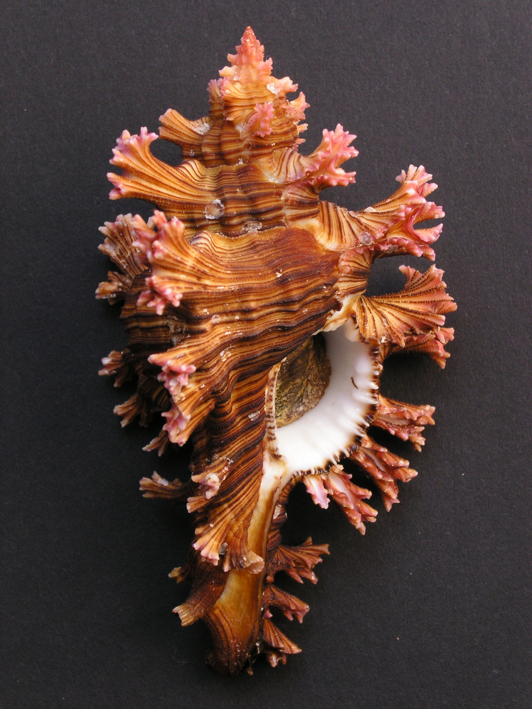 Chicoreus palmarosae Licence: self-made photo, May 2005